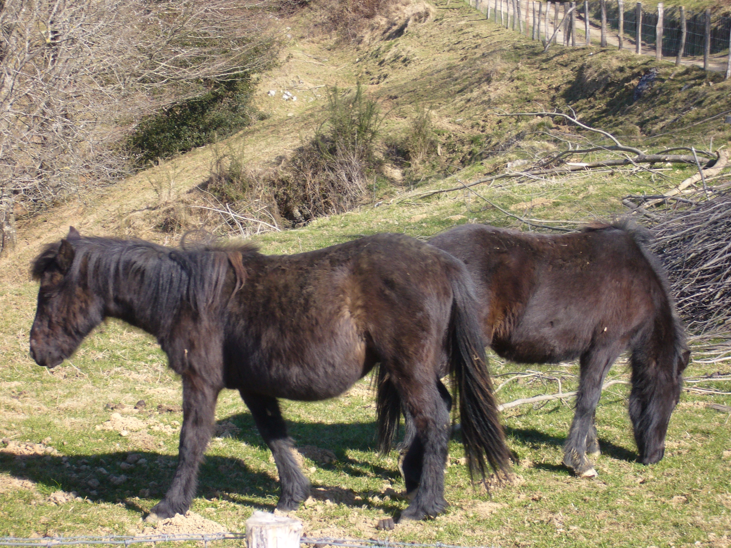 Bi urte inguruko pottoka gazteak